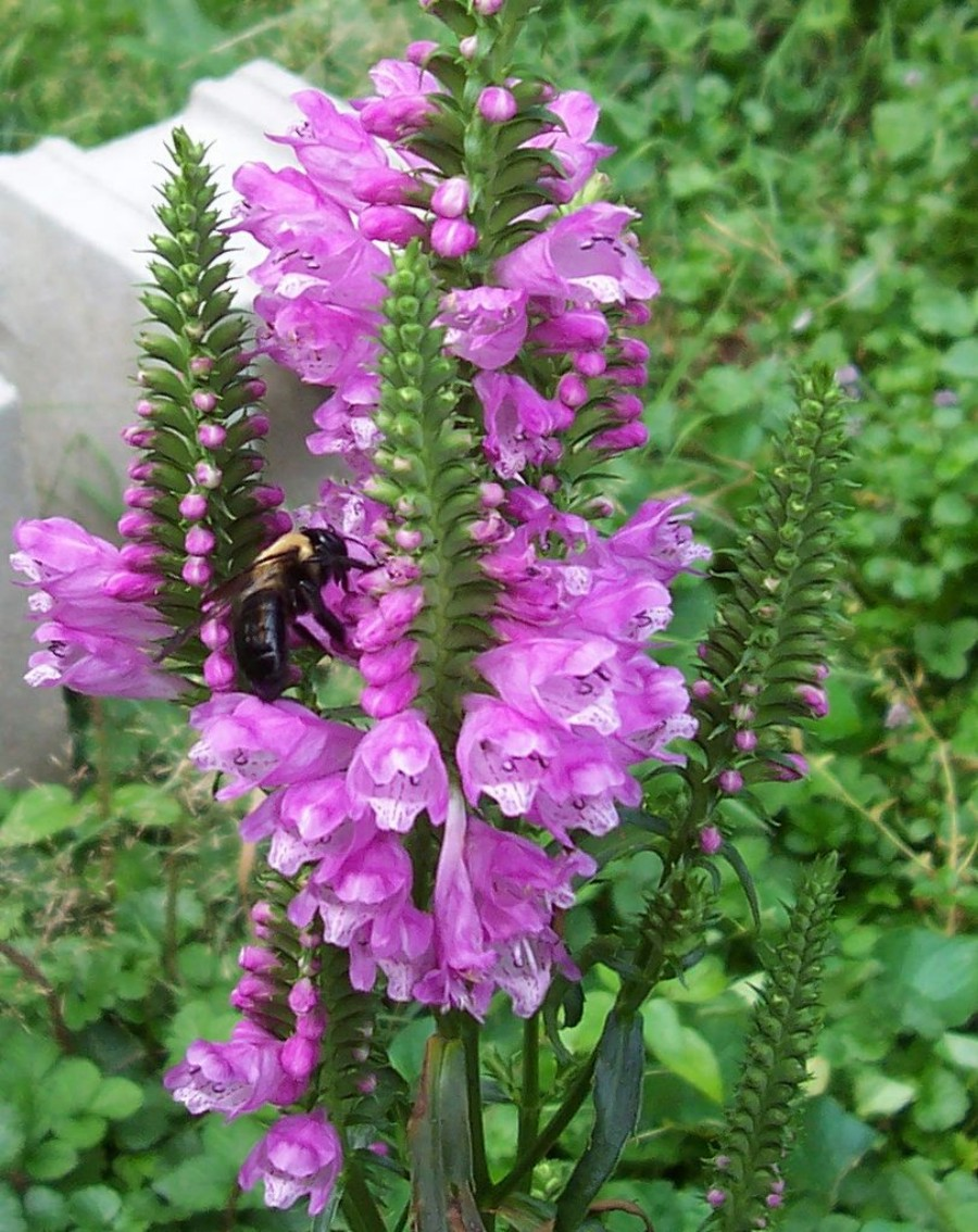 Physostegia virginiana